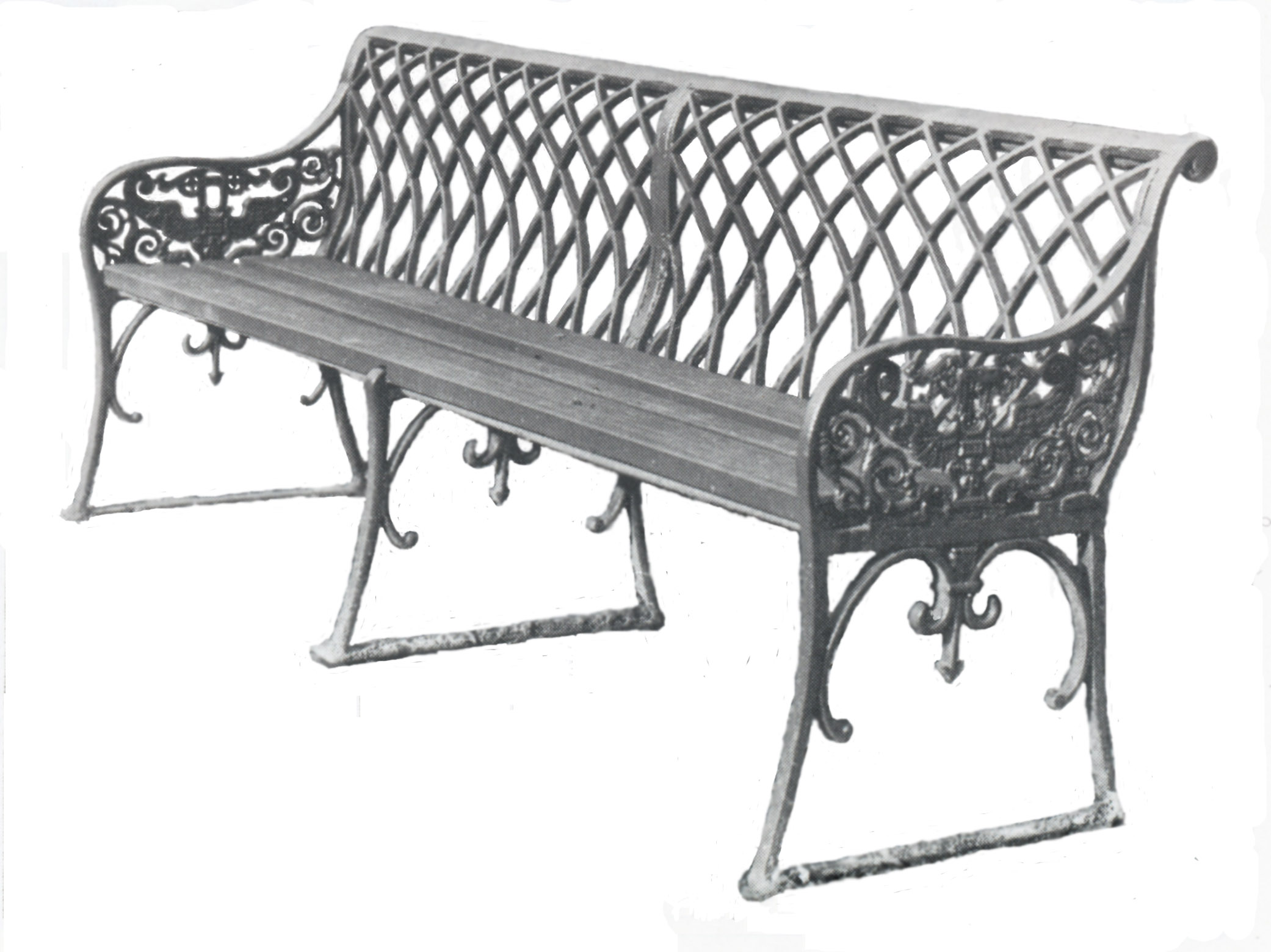 Gusseiserne Sitzbank im Pleasureground am Schloss Glienicke